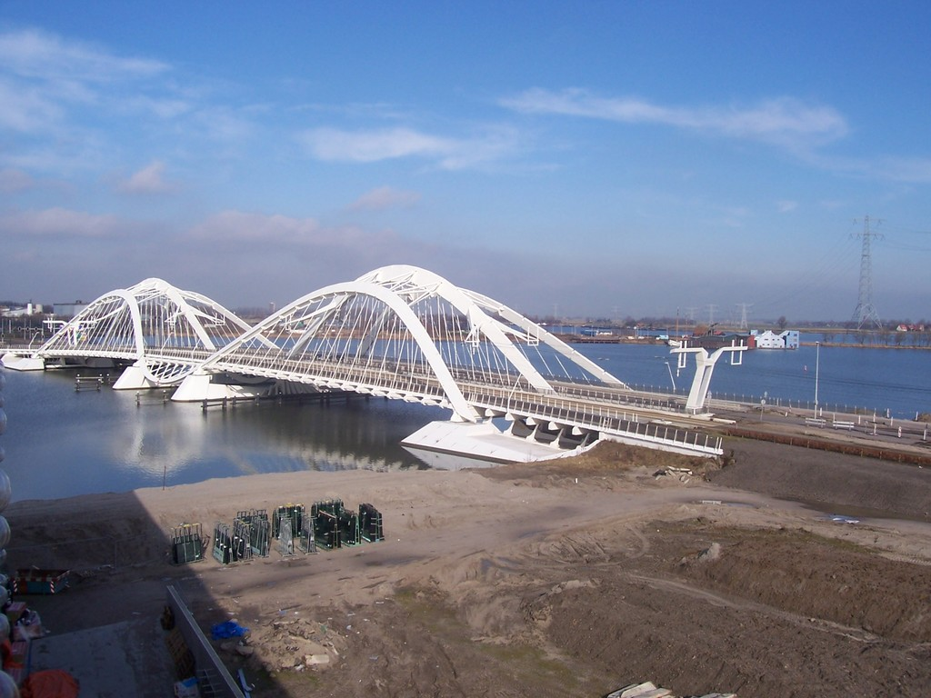 Foto van de Enneus Heermabrug